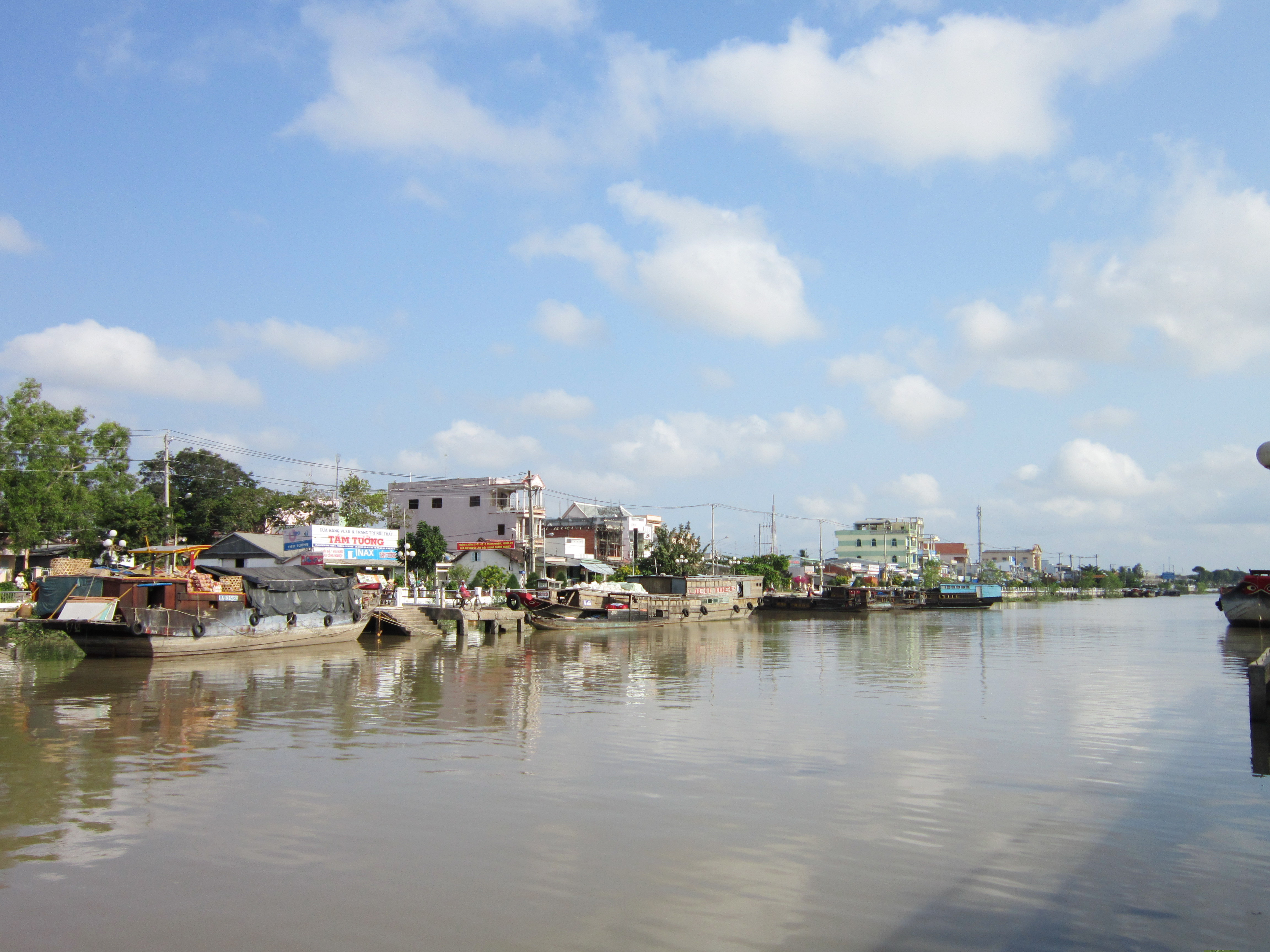 Con kênh này chảy trong thị xã Trà Vinh (Việt Nam).